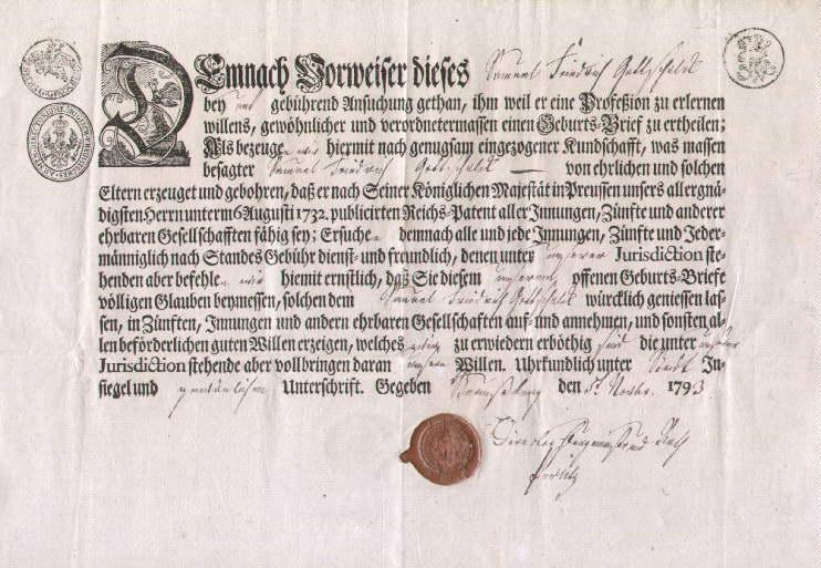 Geburts-Brief für Samuel Friedrich Gottschalck. "weil er eine Profession zu erlernen willens" und "von ehrlichen und solchen Eltern erzeuget und gebohren". Straußberg den 5. November 1793